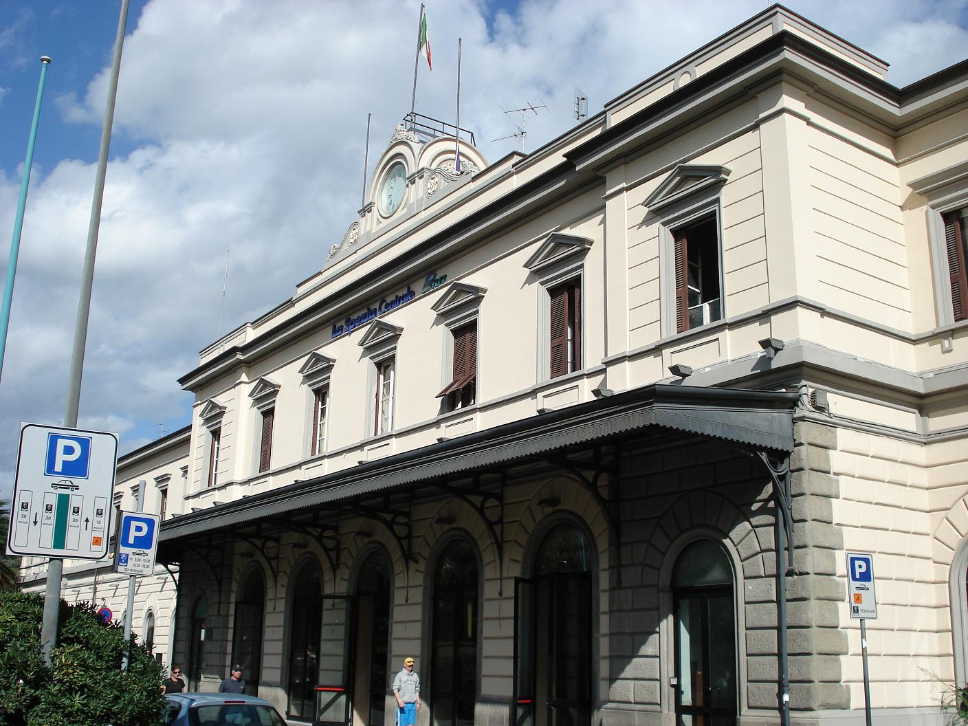 Stazione Ferroviaria - La Spezia - Italia